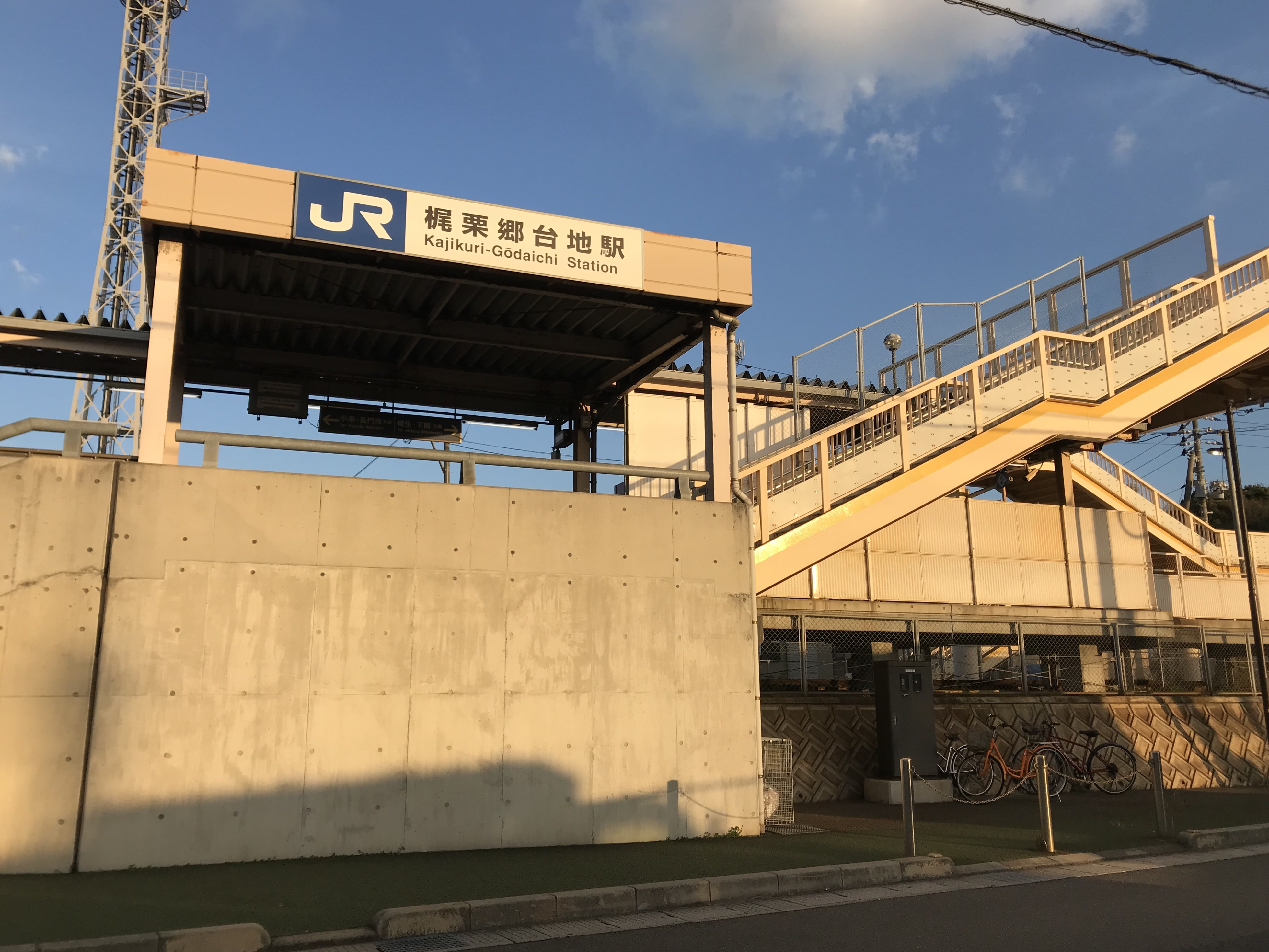 梶栗郷台地駅の駅舎